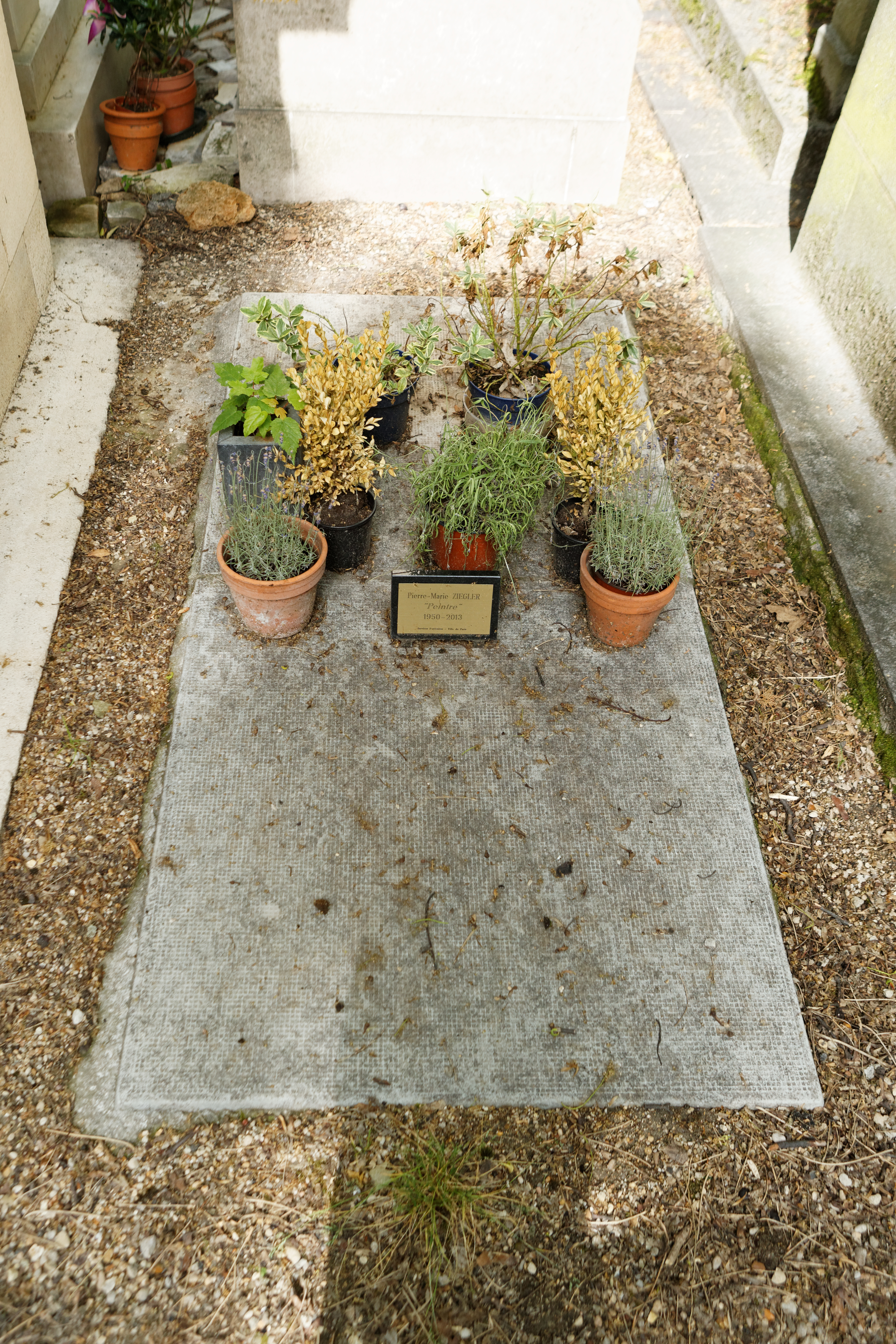 Sépulture du peintre Pierre-Marie Ziegler (1950-2013).